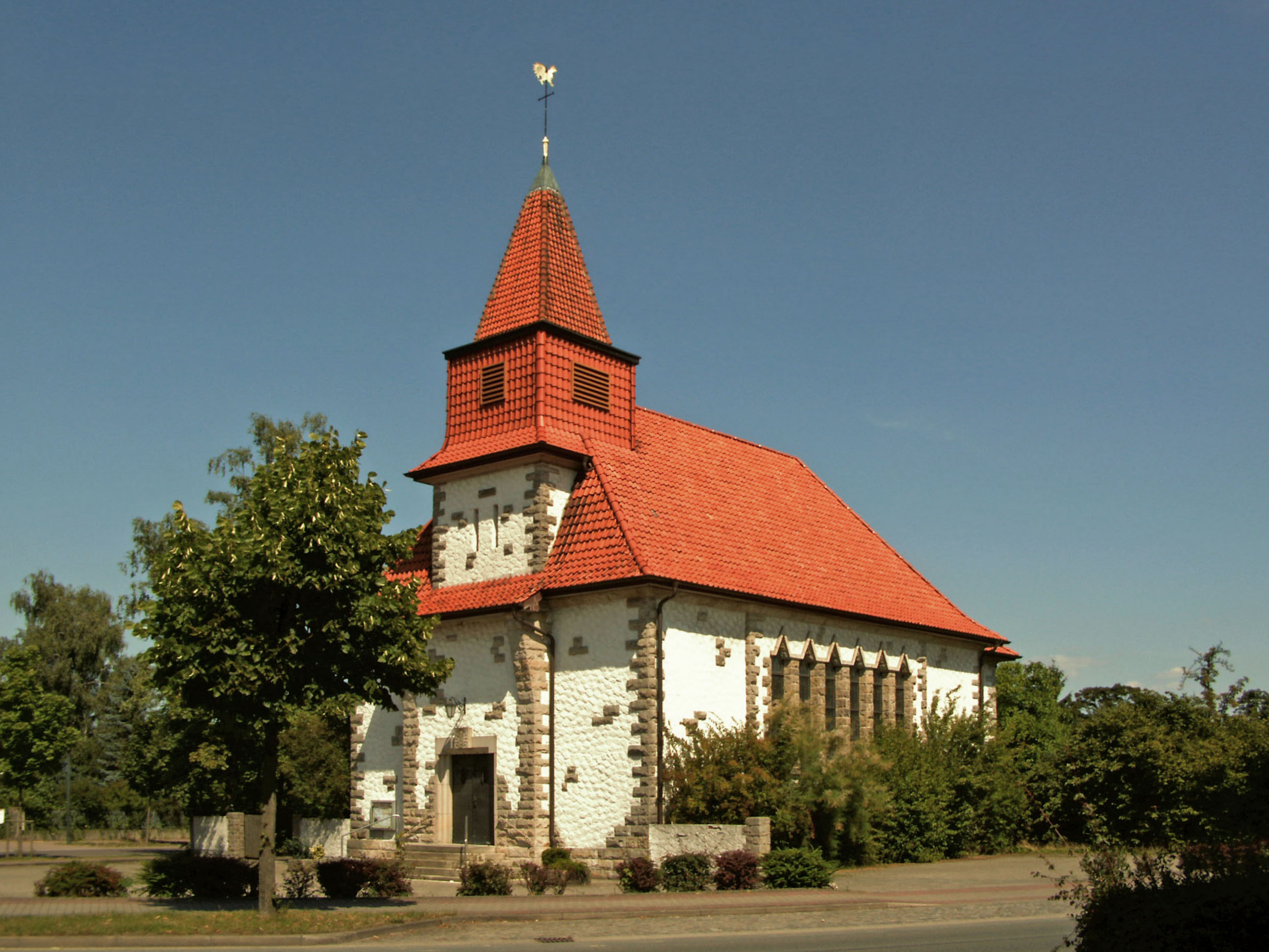 Katholische Kirche Unbefleckte Empfängnis Maria in Velpke, Landkreis Helmstedt